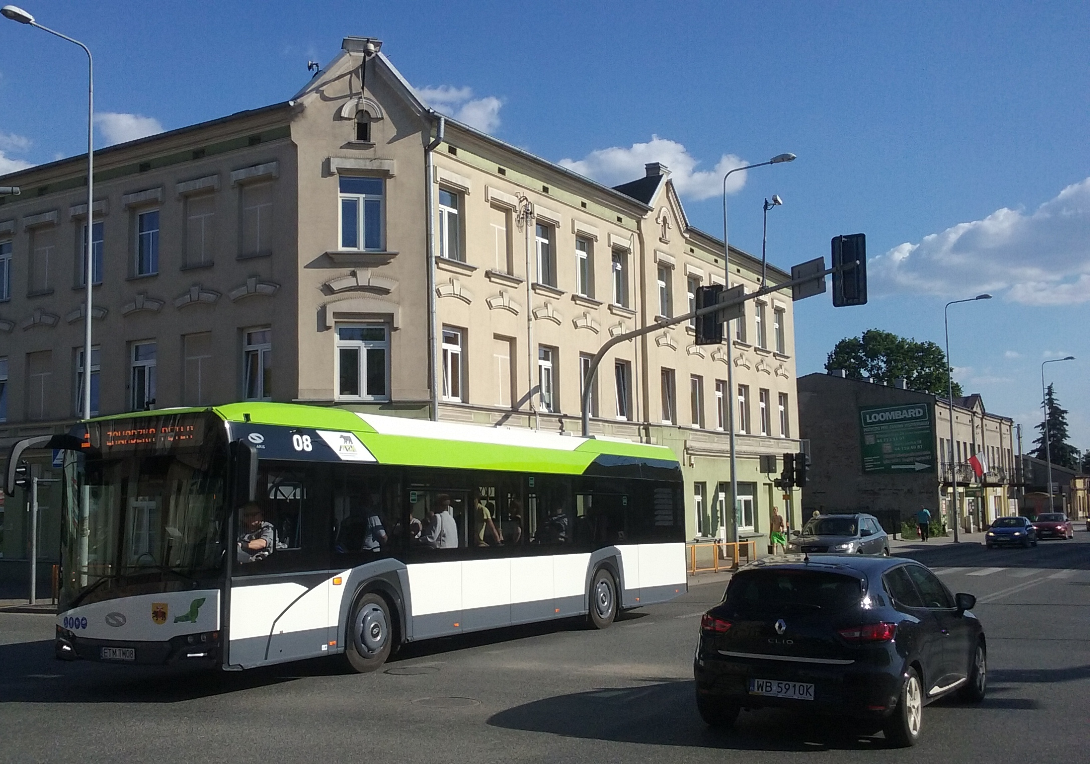 Kamera monitoringu miejskiego na szczycie kamienicy na rogu ulic Warszawskiej i Stefana "Grota" Roweckiego w Tomaszowie Mazowieckim w województwie łódzkim